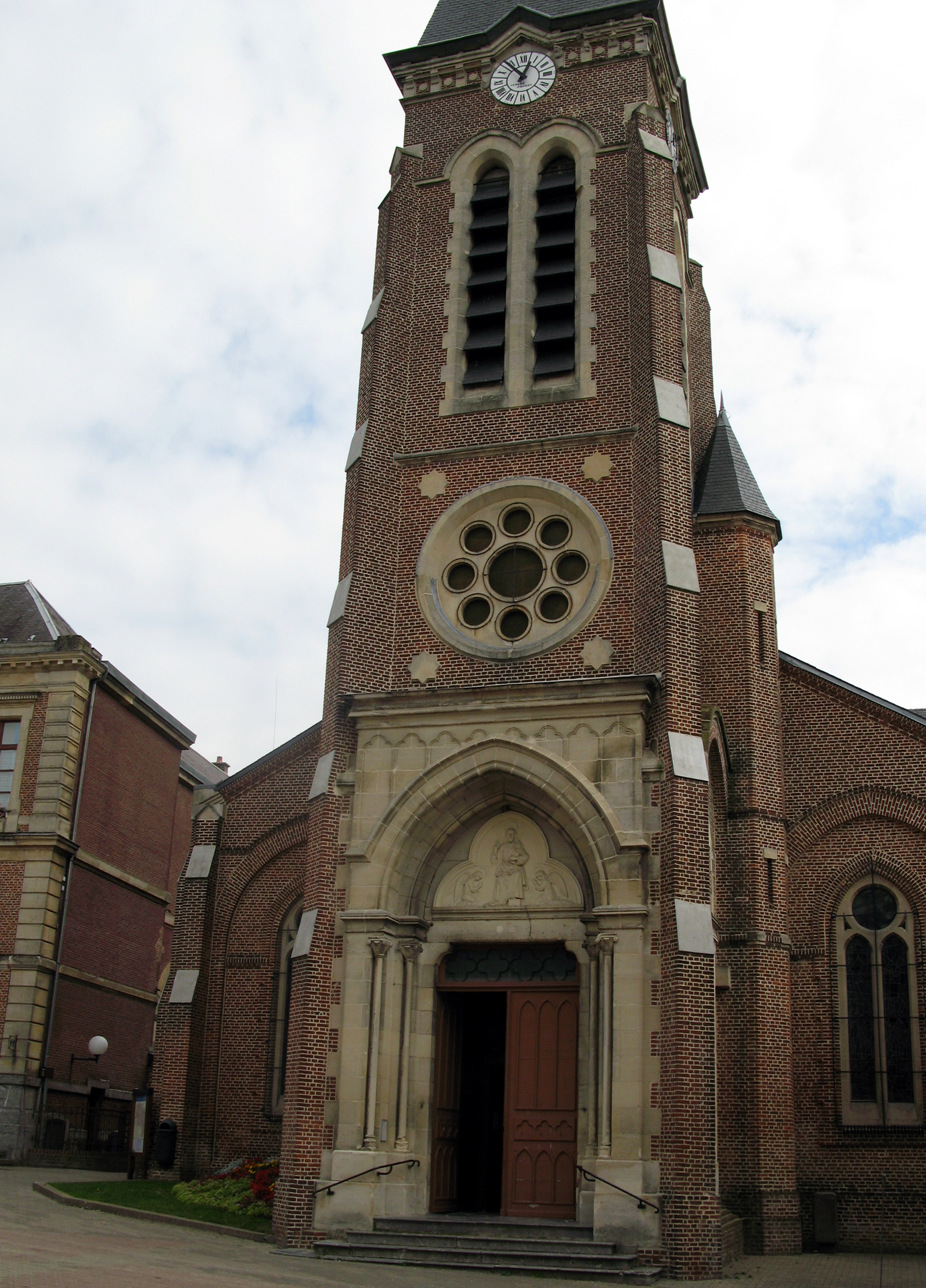 Le Nouvion-en-Thiérache (Aisne, France) - L'église.